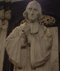 Beeld van Pastoor van Ars (1935) door de Gentenaar 0. Sinia in de sacramentskapel van de Sint-Baafskathedraal Gent.